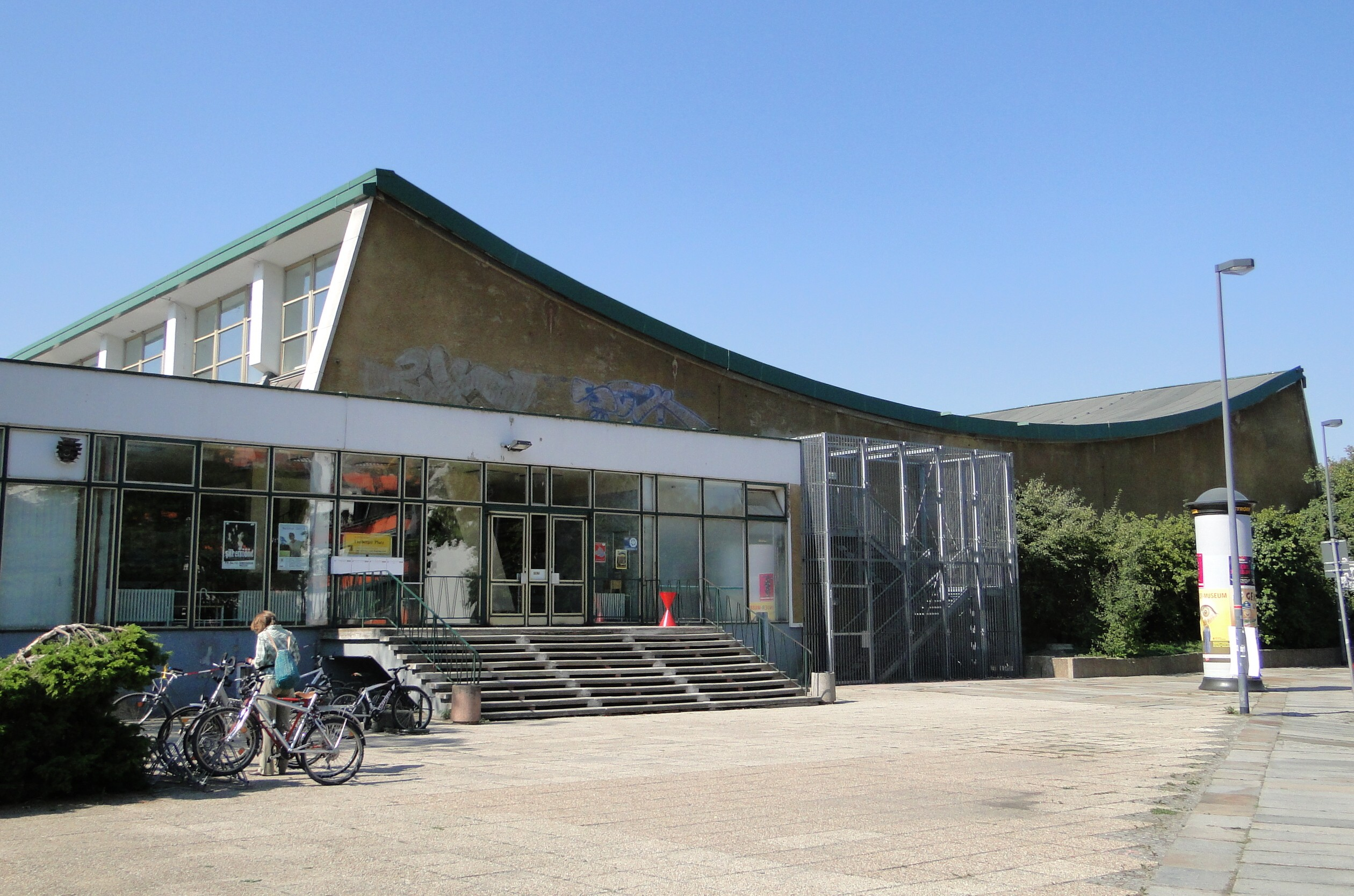 Schwimm- und Sprunghalle Freiberger Platz in Dresden